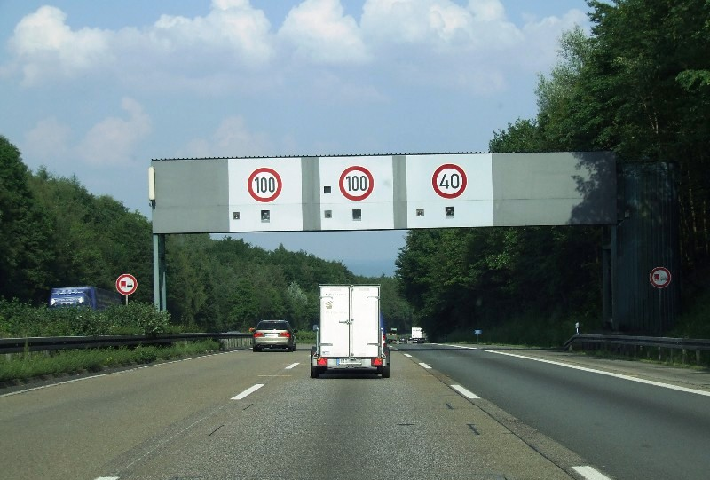 Bundesautobahn 3